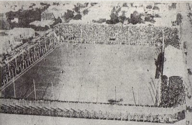 velez